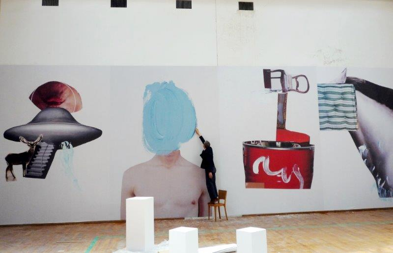 An installation designed to transform the perception of a space by using of large-scale prints from series LESS, Museum for contemporary art, Belgrade by Sergei Sviatchenko.